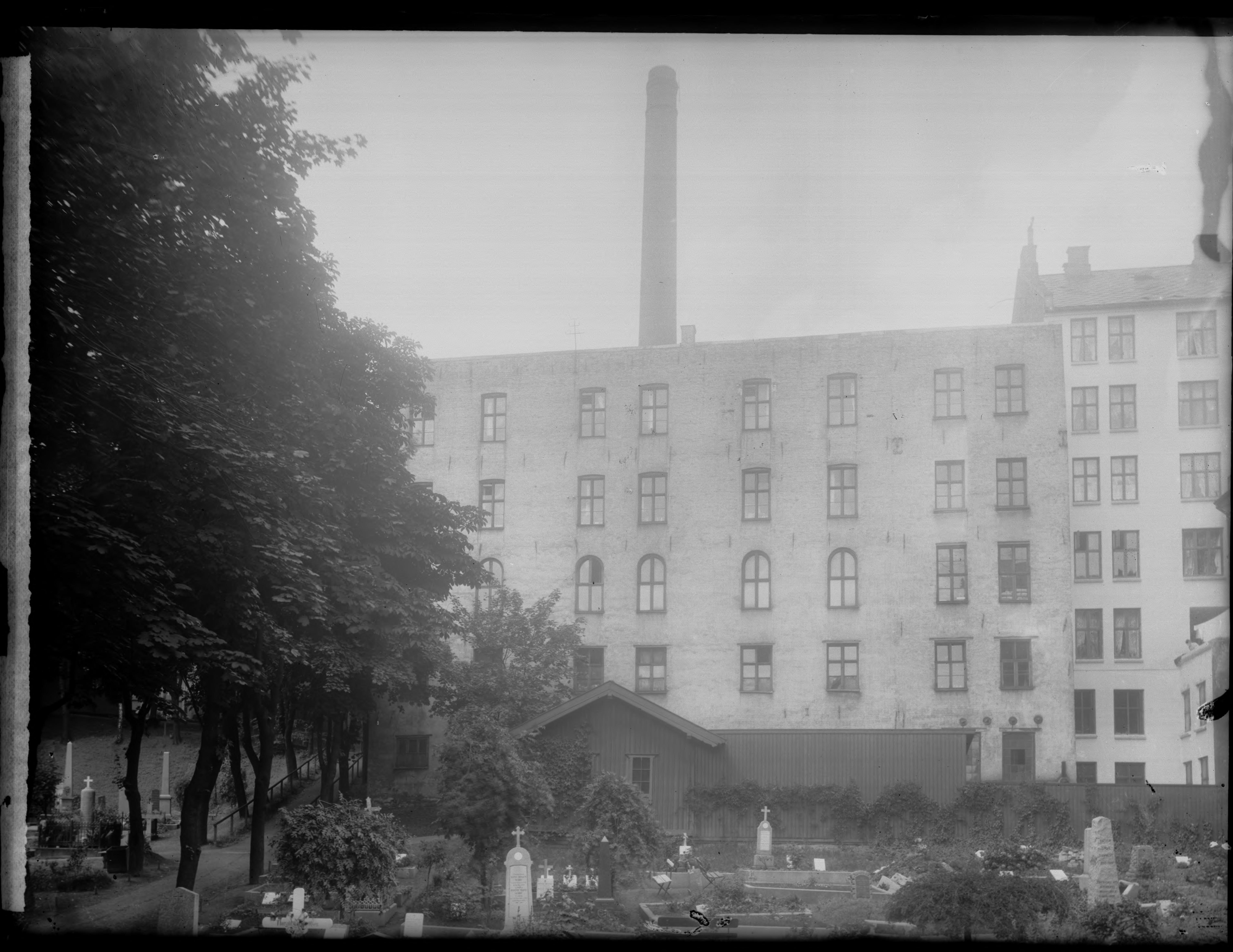 Bildet er hentet fra Nasjonalbibliotekets bildesamling. Anmerkninger til bildet var: Påskrift arkivark: H. Meyers Trikotagefabrik Eldste arkivnummer: 880 Yngre arkivnummer: 137 Oslo, Oslo, Oslo